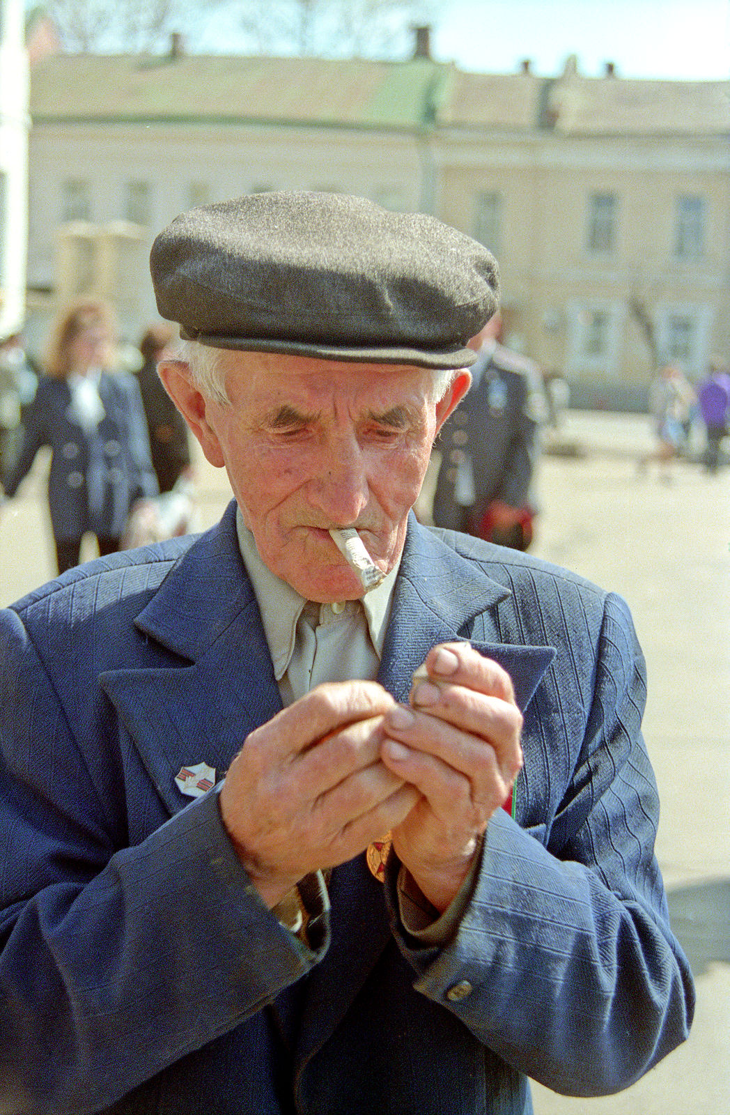 Сократ Павлович Сергиевский (09.01.1924) — ветеран Великой Отечественной войны, стоит на Народной площади в городе Переславле.